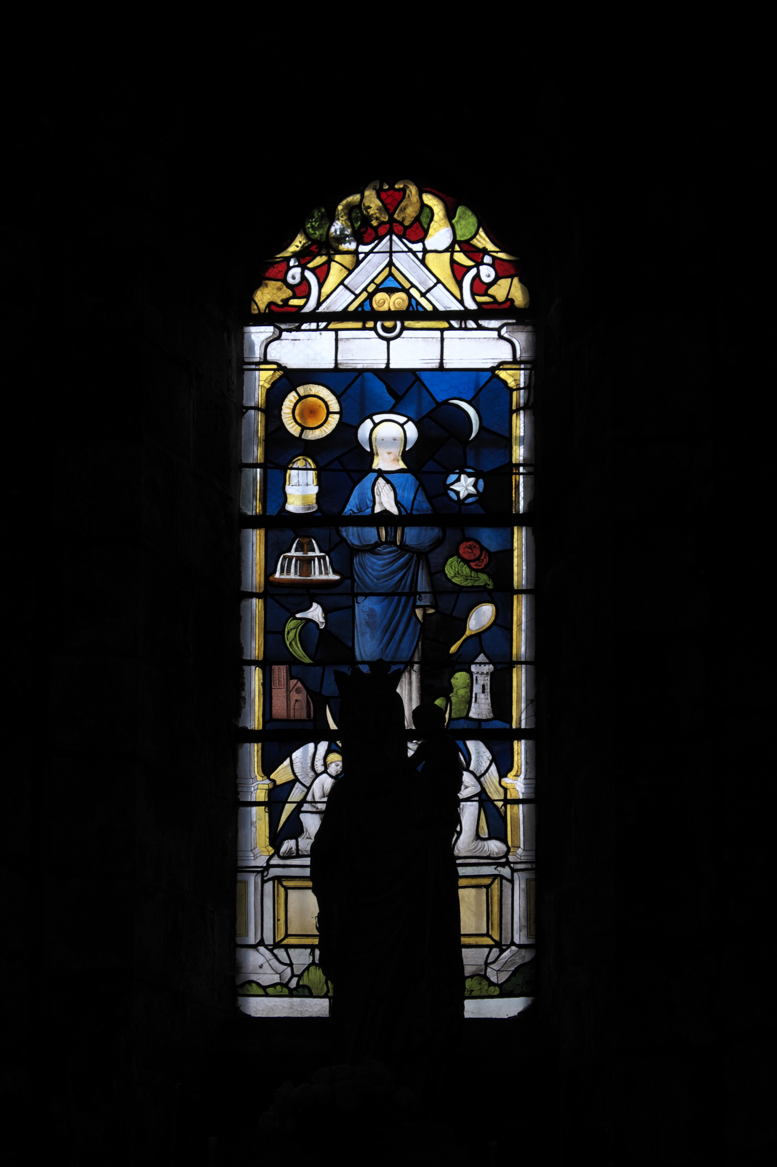 Katholische Pfarrkirche Notre-Dame-de-l'Assomption in La Ferté-Alais im Département Essonne (Île-de-France/Frankreich), Bleiglasfenster, Darstellung: Maria und Mariensymbole